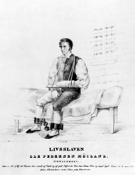 Litografien er en etterlysningsplakat. Se protokoll. Påtegnet under billedfl.: Livsslaven/ Ole Pedersen Høiland./ Signalement: / Han er fød 1797, 68 1/2 Tomme høi, rank af Væxt og af god udseende. Han har blaae øine og noget lyst Haar, et Ar paa det/høire Skinnebeen samt flere paa Henderne - J.nr. 162 i O.B's katalog av 1909.